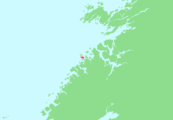 Locator map of Halmøya, Nord-Trøndelag, Norway